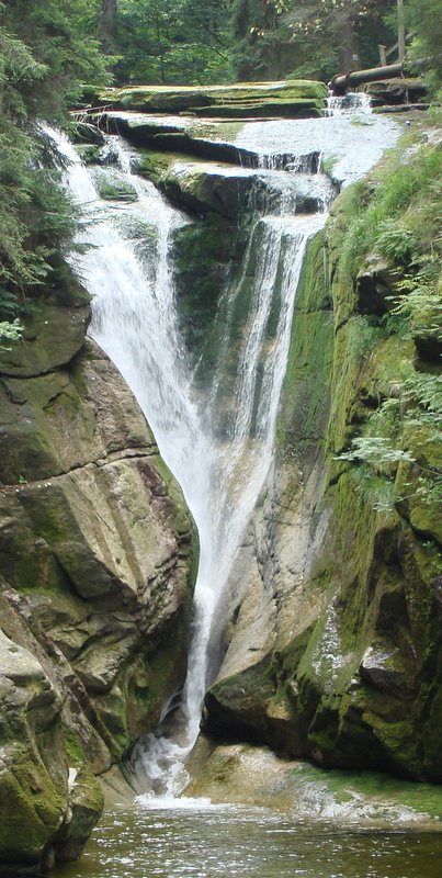 Karkonosze, Wodospad Szklarki